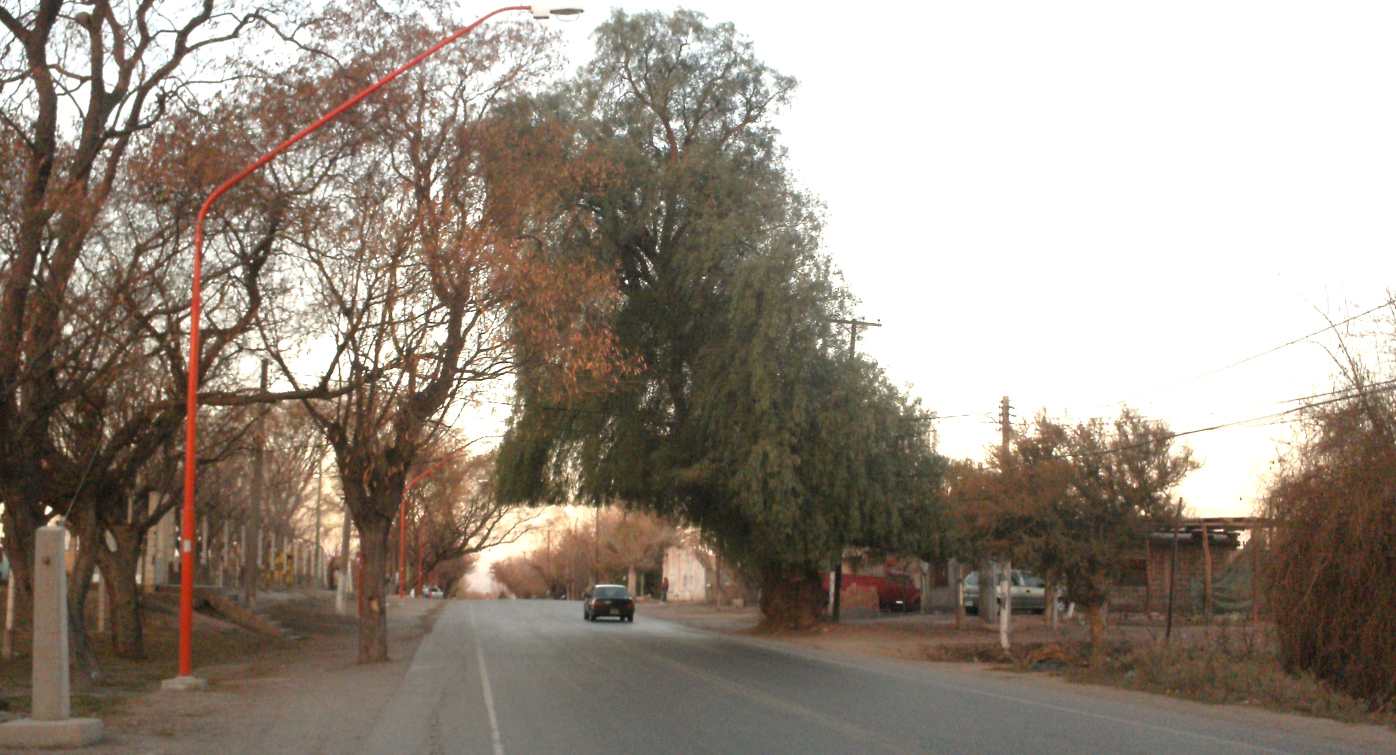 La entrada a altos de sierras, con su clasica loma